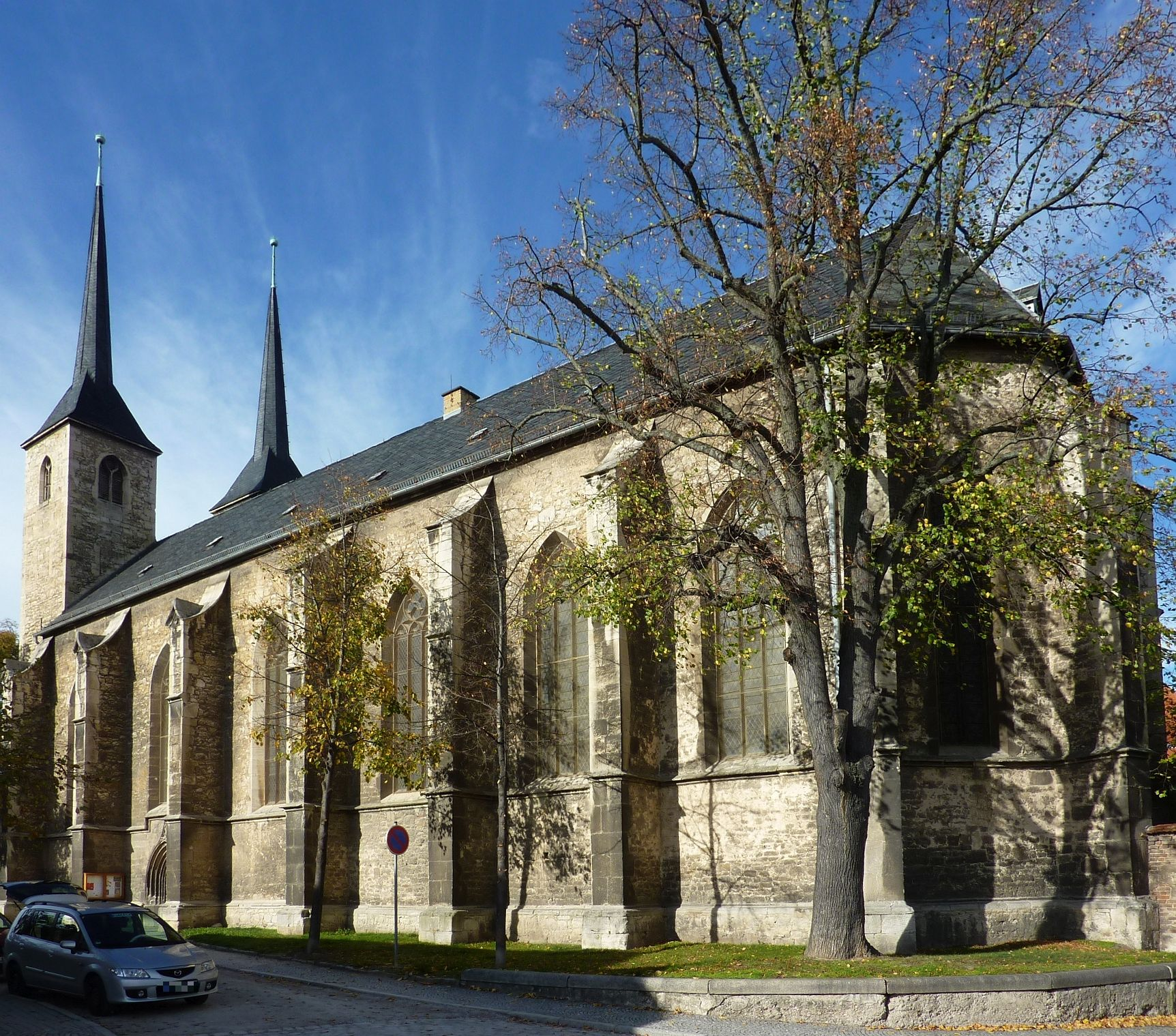 Moritzkirche (Naumburg)